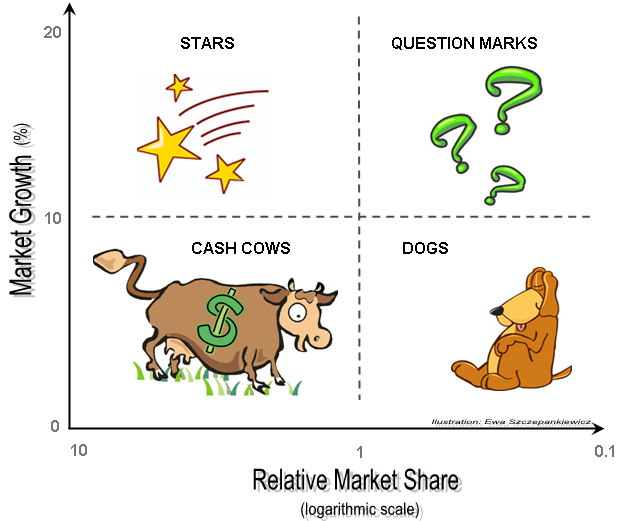 ԲԿԳ Մատրիցա